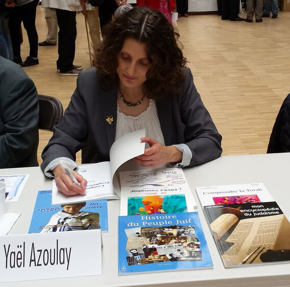 Yael Hollenberg lors d'une séance de dédicace au Carreau du Temple